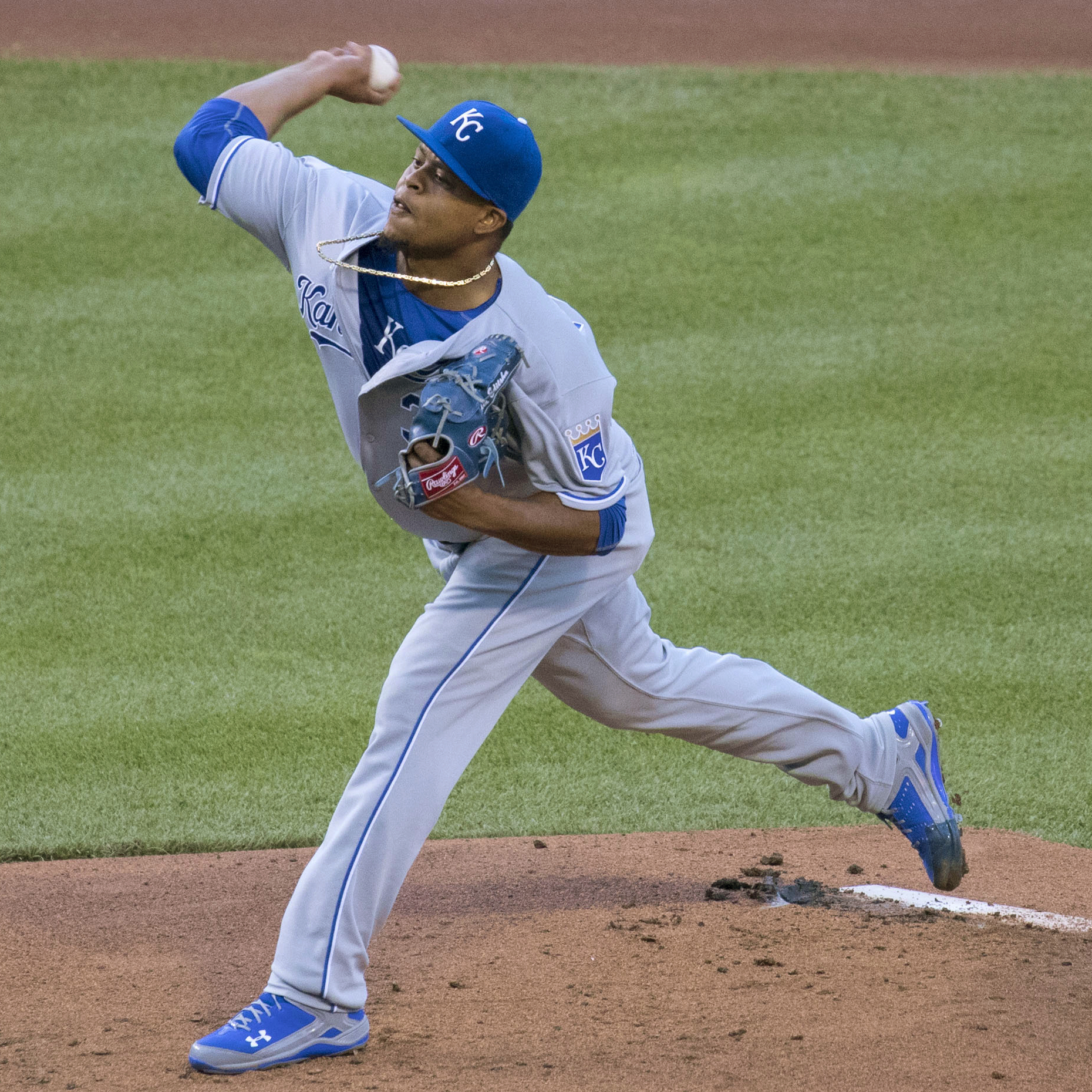 Edinson Vólquez